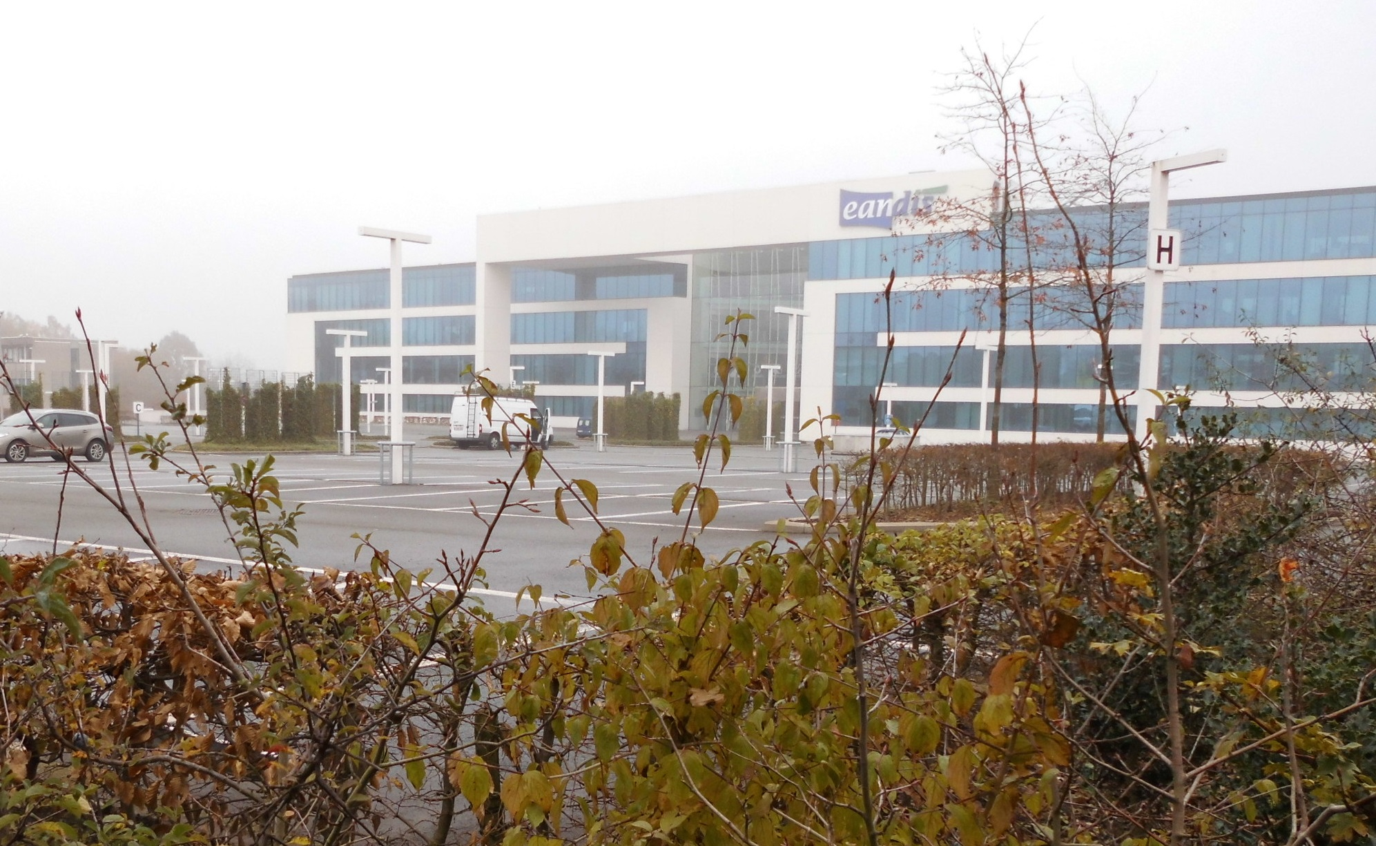 Het voormalige Eandis - nu Fluvius - foto 2013 - Brusselsesteenweg - Melle - Oost-Vlaanderen - België